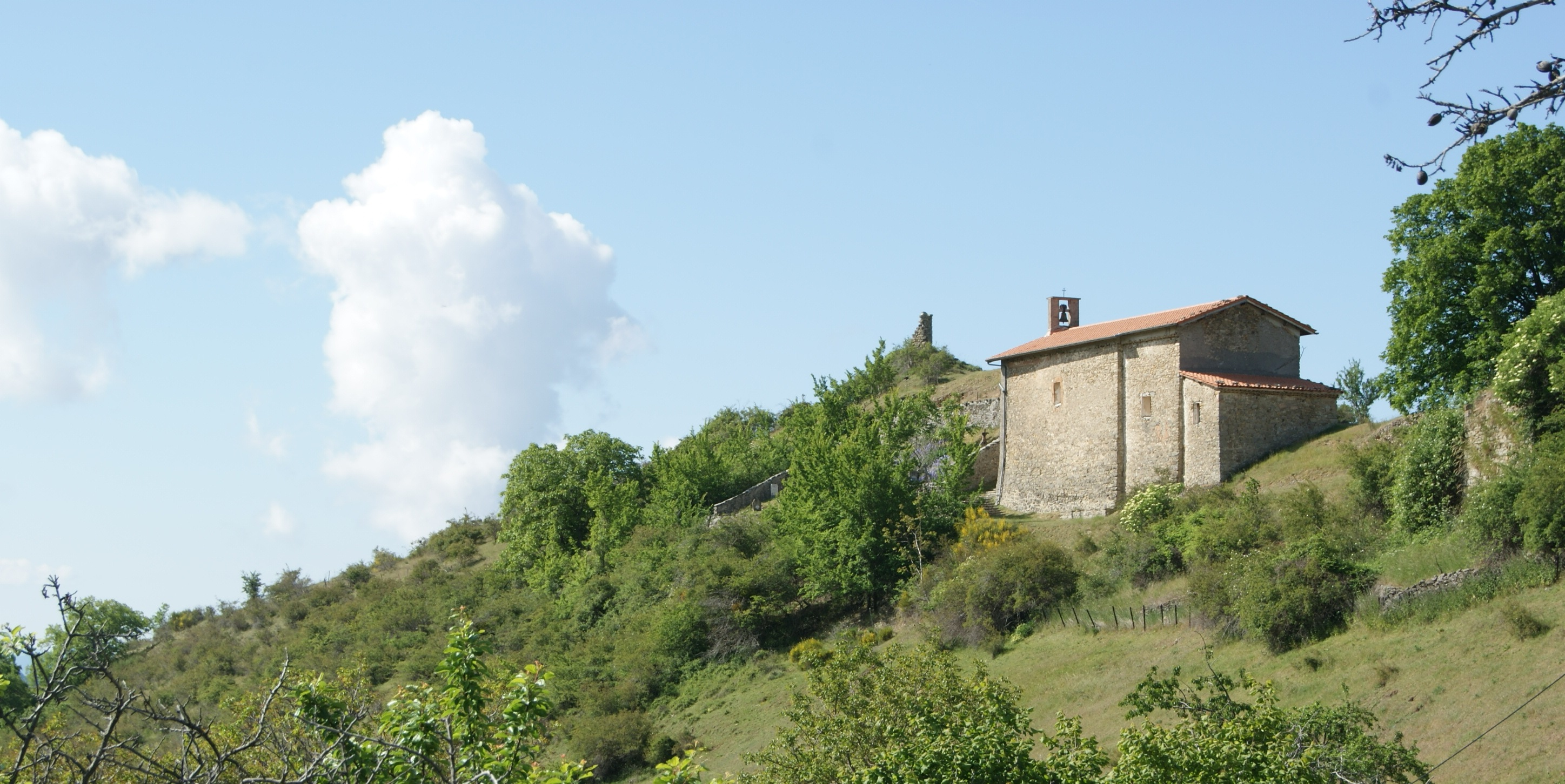 La Chapelle Notre-Dame et les ruines du castel au second plan